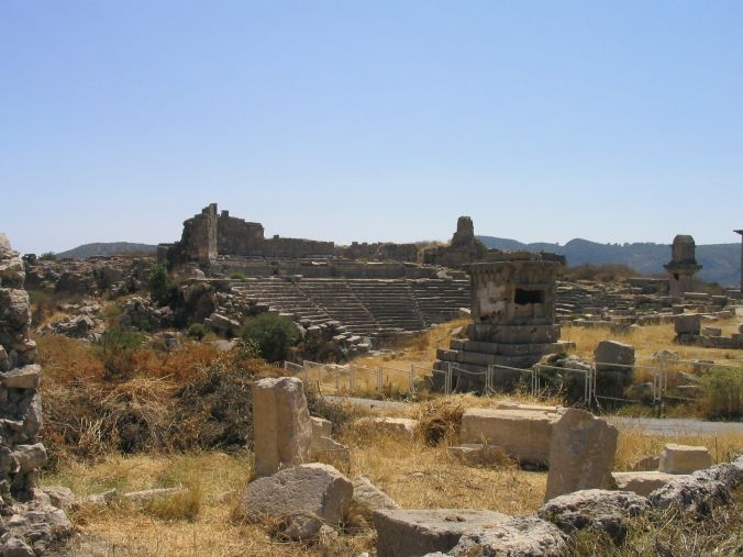 groby licyjskie